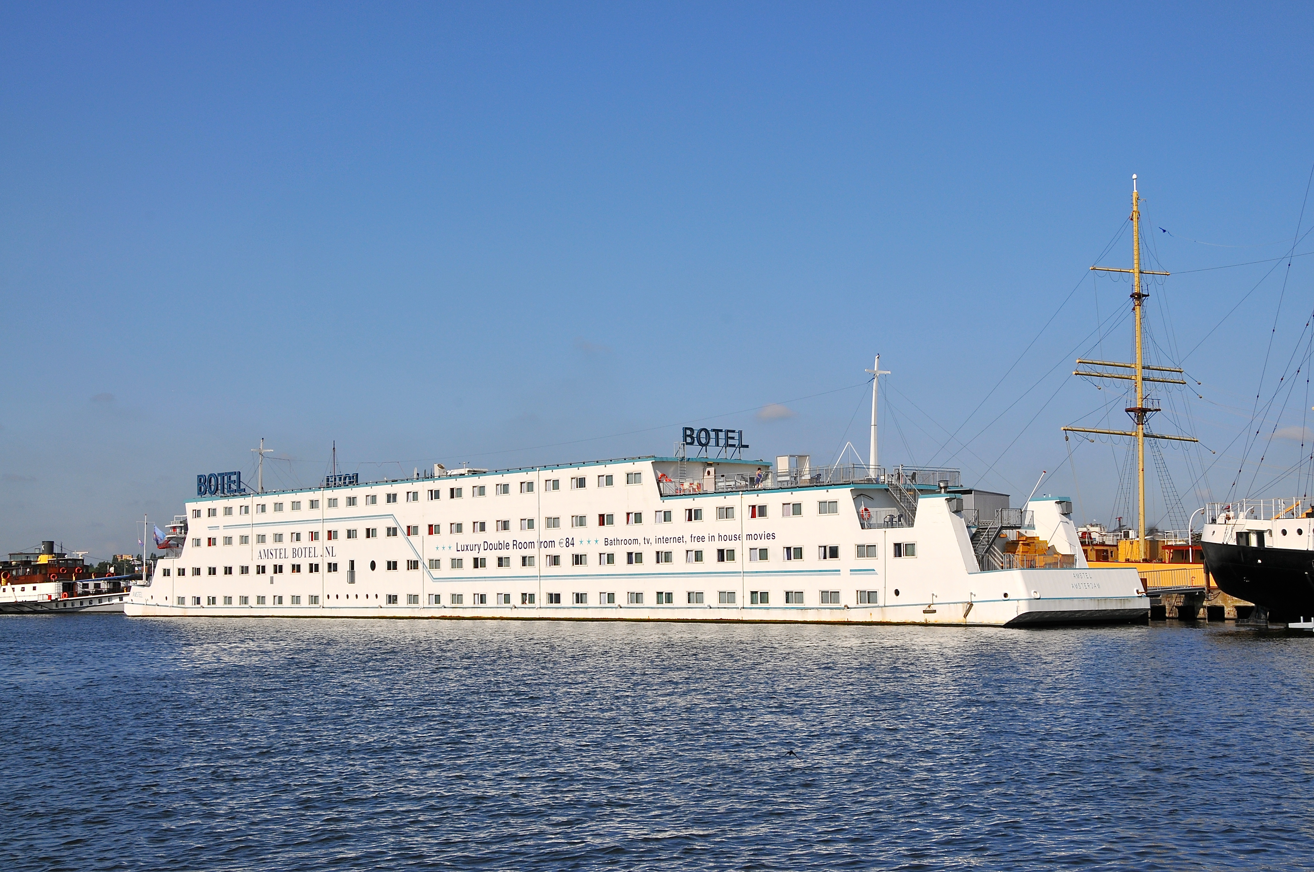 NDSM Pier 3.